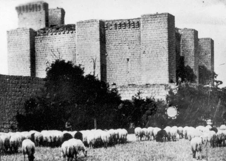 Castillo - Villalba de los Alcores (Valladolid) - Colección de cromos álbum de Valladolid editado por la Caja de Ahorros Provincial en 1962. Castillo de Villalba de los Alcores. Fue construido por los caballeros hospitalarios de la Orden de San Juan, al regresar de la primera Cruzada. En él permaneció unos días con el cadaver de su esposo Doña Juana la Loca. Sirvió de prisión al Delfín de Francia y al Duque de Orleans, rehenes de Carlos V a cambio de la libertad de Francisco I. - Fotografía 60 x 42 B/N